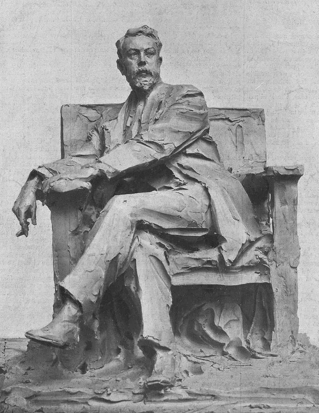 El eminente escultor [sic] español Joaquín Sorolla y Bastida, escultura del príncipe Troubetzkoi.